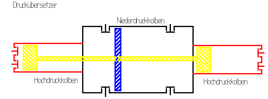 Prinzip eines Druckübersetzers.